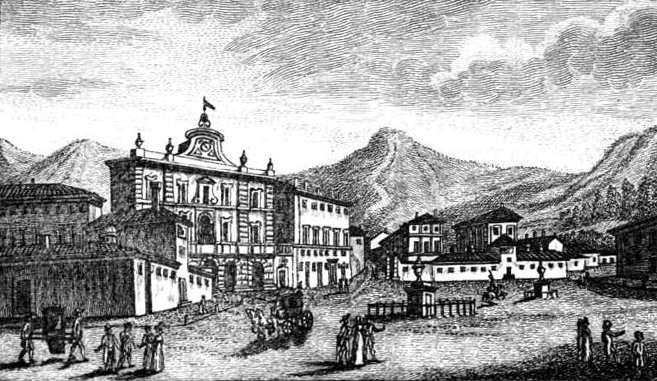 Vecchia illustrazione degli stabilimenti termali di San Giuliano Terme